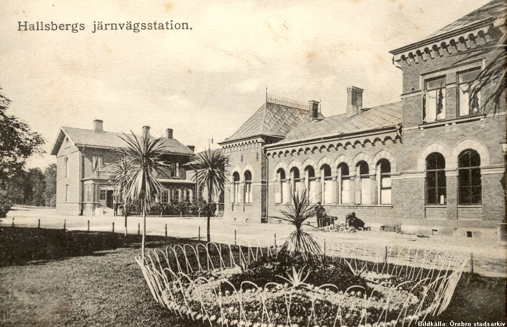 Hallsbergs järnvägsstation någon gång under 1920-talet